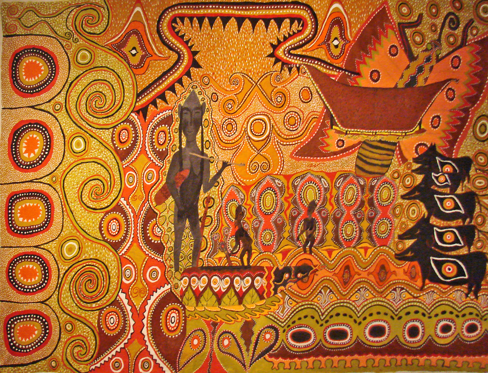 Kumurr Peinture acrylique sur toile de Chiphowka Robin Kowspi (peintre Kwoma) Exposition "peintures mythiques de Nouvelle-Guinée" Musée du quai Branly